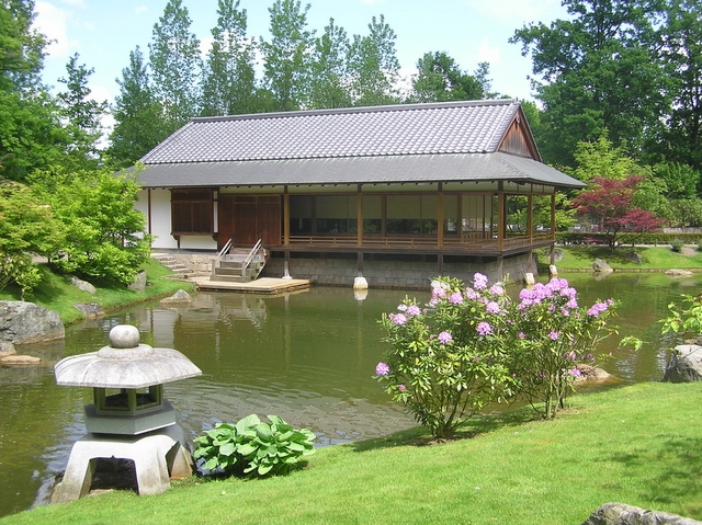 foto Mike, 22 mei 2005